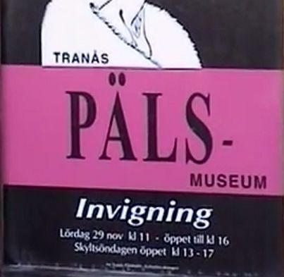 Plakat zur Eröffnung des Pelzmuseum in Tranås, Schweden.